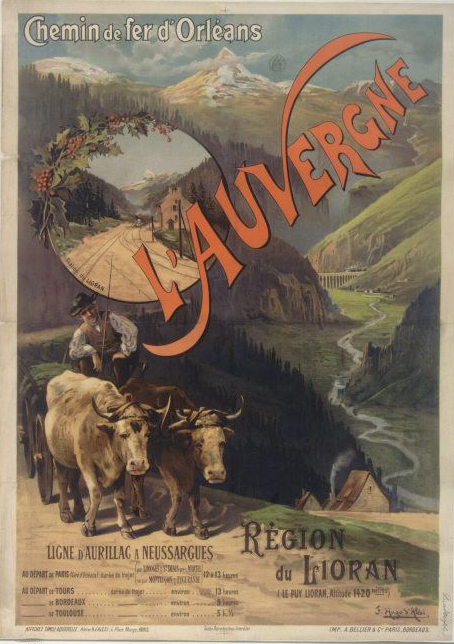 Affiche publicitaire pour le Cantal de la Compagnie des chemins de fer de paris à Orléans, par Hugo Alesi, provenant du site de la BNF. marges enlevées, couleurs avivées.